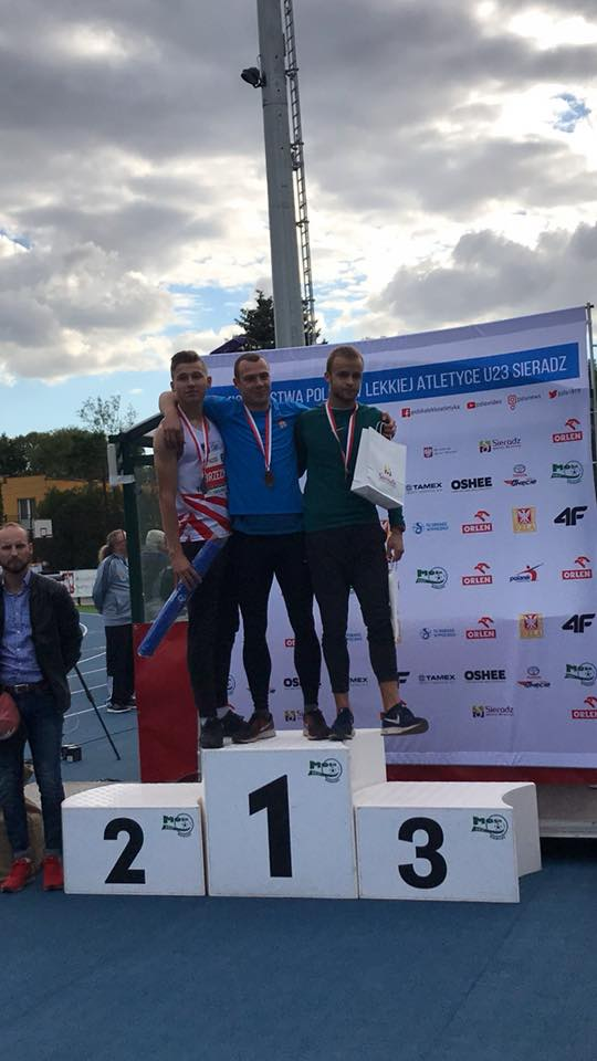 Brąz Mistrzostw Polski u23